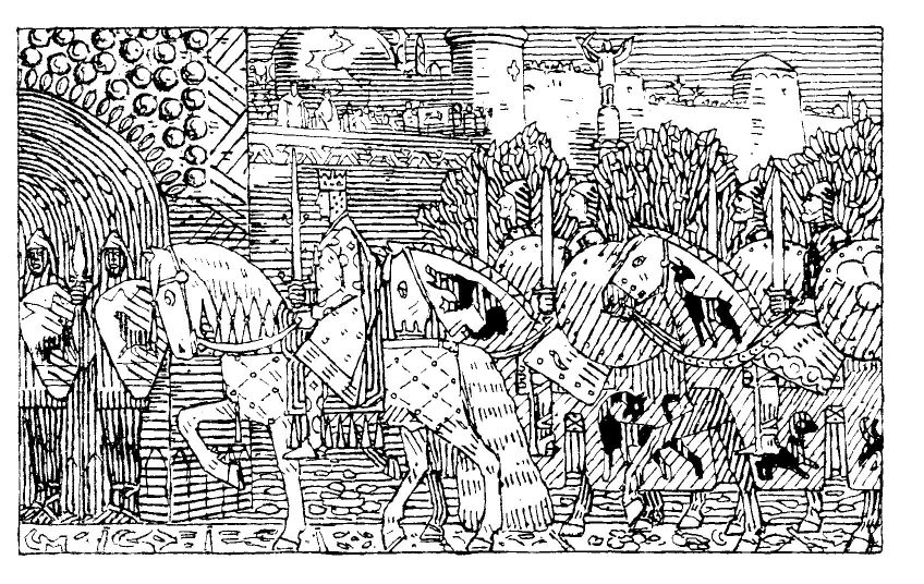 Gerhard Munthe: Illustration for Magnussønnens saga. Snorre 1899-edition. nn: «Kong Sigurd og mennene hans rir inn i Miklagard.» nb: «Kong Sigurd og hans menn rir inn i Miklagard.»